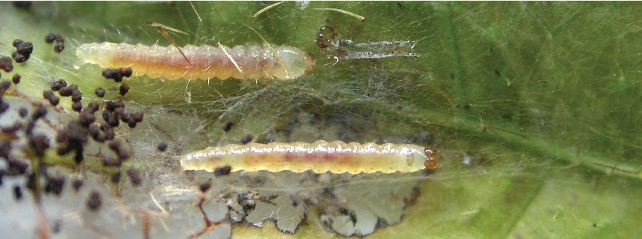 Niveas kone